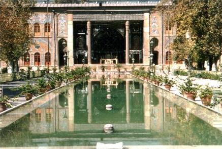 كاخ گلستان تهران. عكس گرفته شده توسط مانی پارسا.